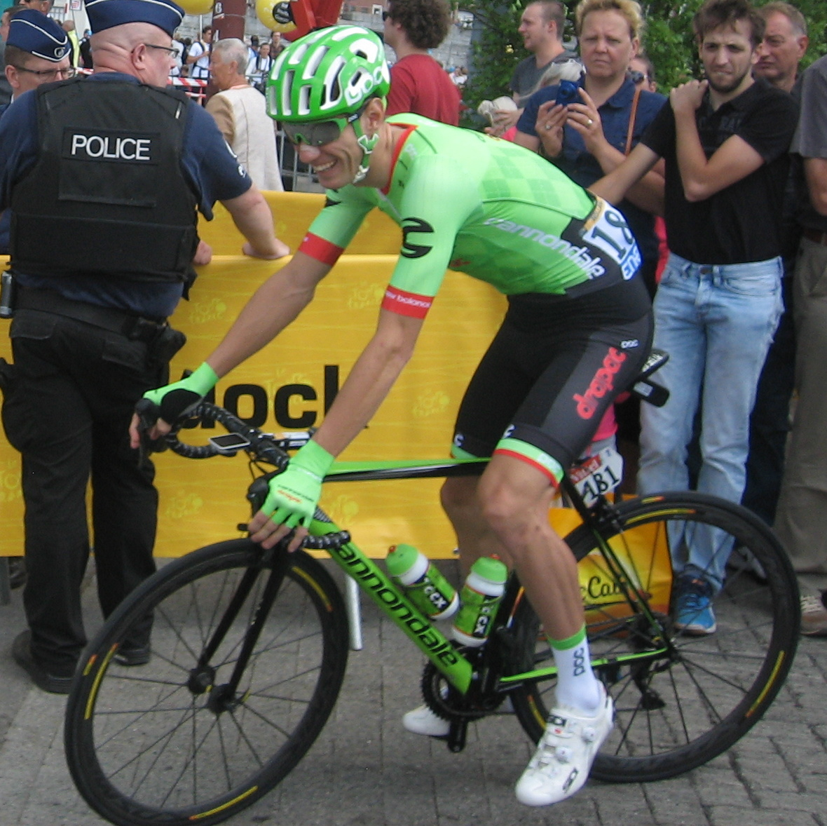 Start in Verviers (België) van de 3e etappe van Le Tour de France 2017.